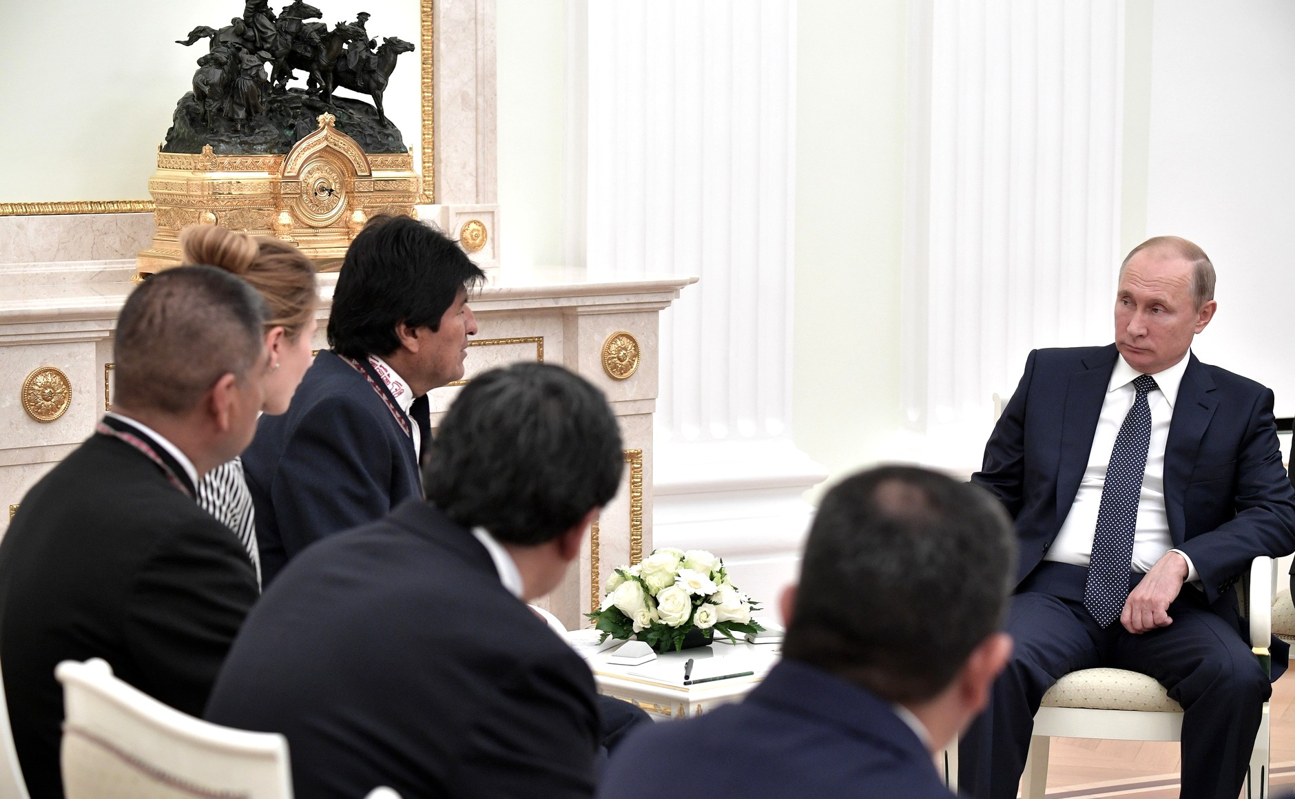 Встреча Президента России Владимира Путина с Президентом Многонационального Государства Боливия Эво Моралесом